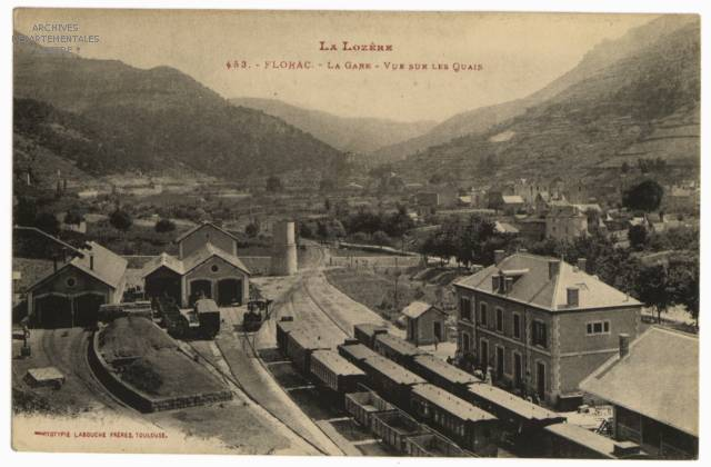 Carte postale de la Gare de Florac, vue d'ensemble.